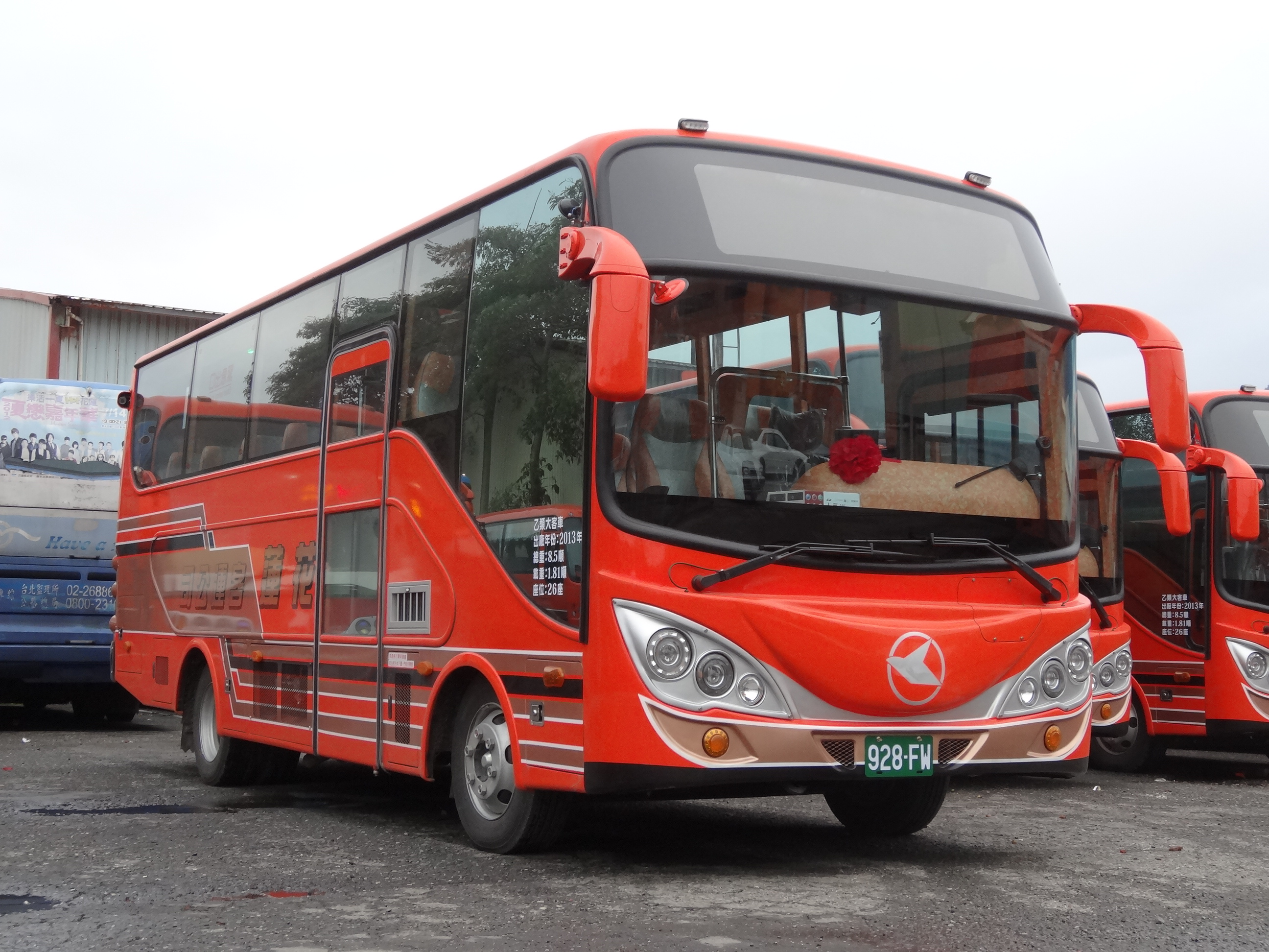 花蓮客運928-FW 2014.02.05攝於花蓮客運保養廠(經同意下拍攝)